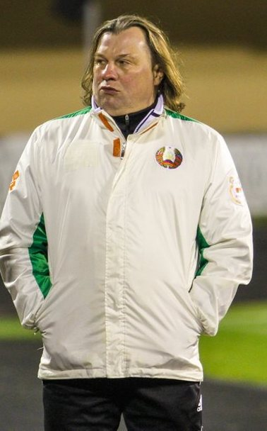 Ігор Ковалевич - тренер молодіжної збірної Білорусі з футболу